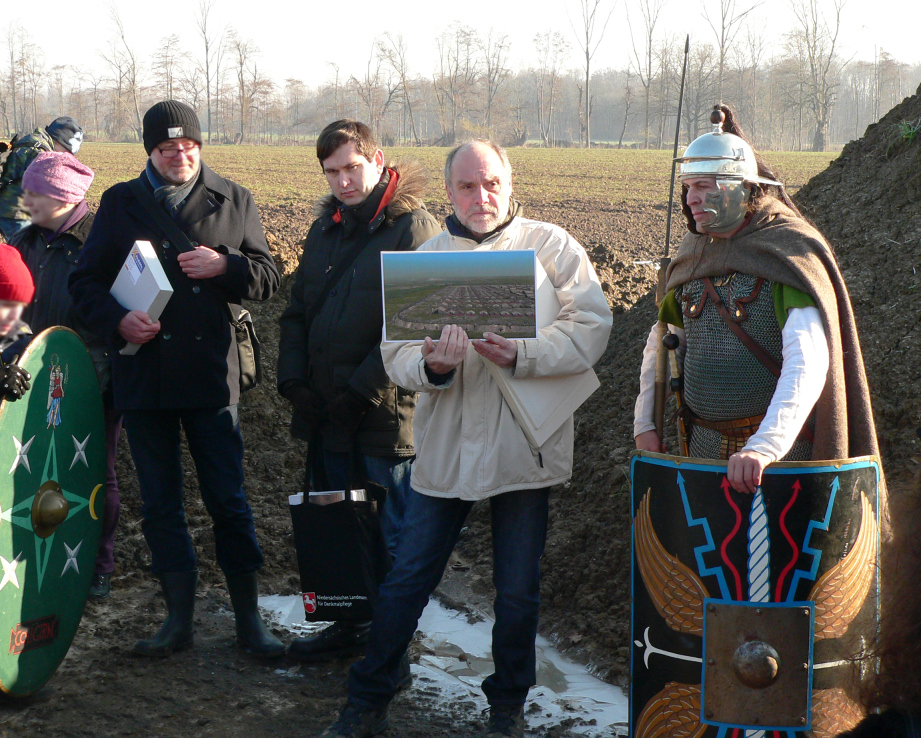 Führung am Gelände des römischen Marschlagers von Wilkenburg durch die Römer Arbeitsgemeinschaft Leine, die Numismatische Gesellschaft zu Hannover und das Niedersächsisches Landesamt für Denkmalpflege, rechts Träger einer römischen Militärausrüstung, im Hintergrund der Bereich des Marschlagers